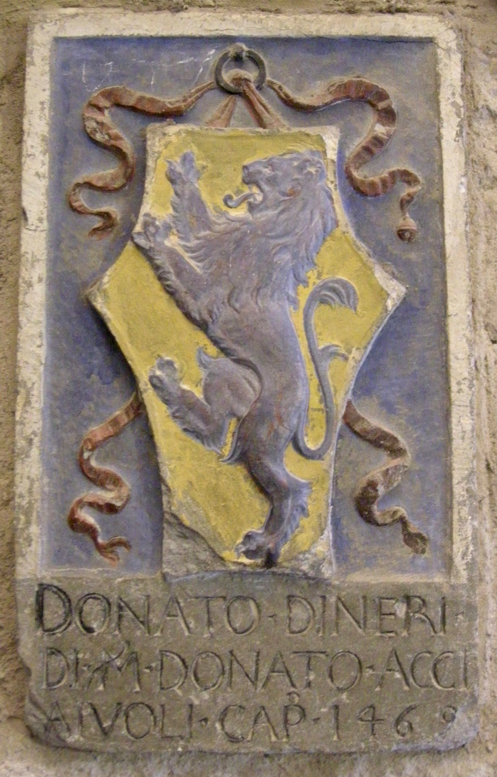 Palazzo dei priori di volterra, interno, stemma acciaiuoli